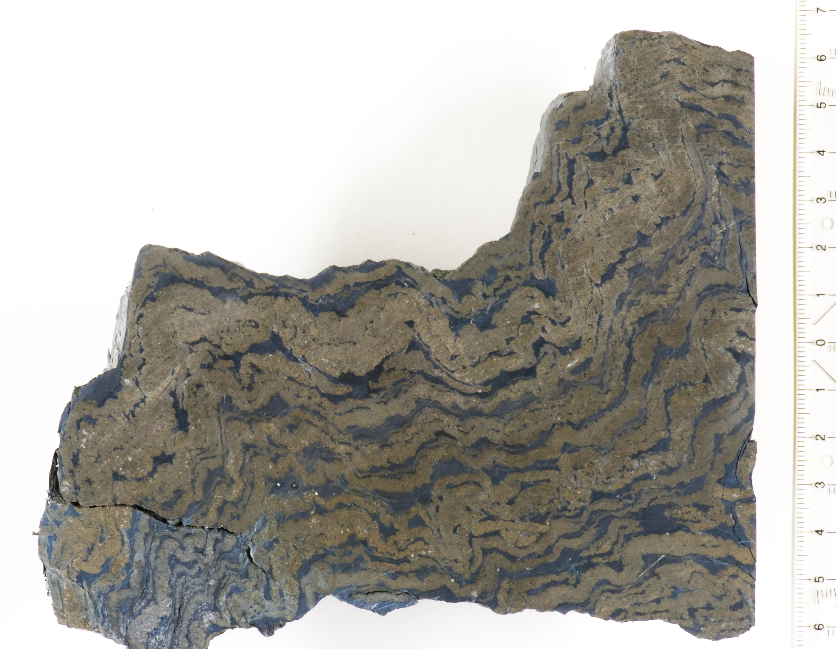 Melierterz (pyrite ore), mine Rammelsberg, Goslar, Harz, Germany